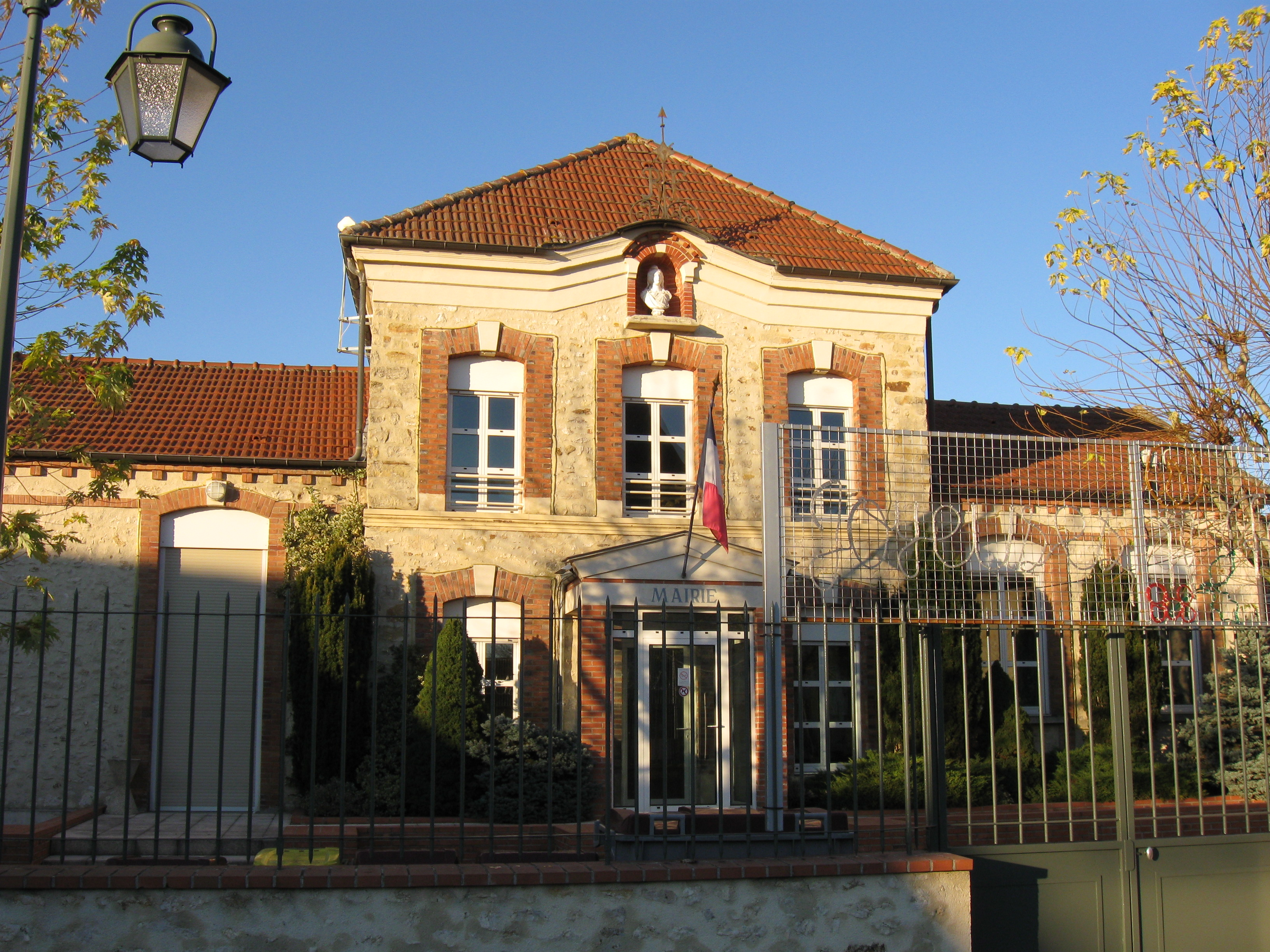 Mairie de Forges. (département de la Seine-et-Marne, région Île-de-France).